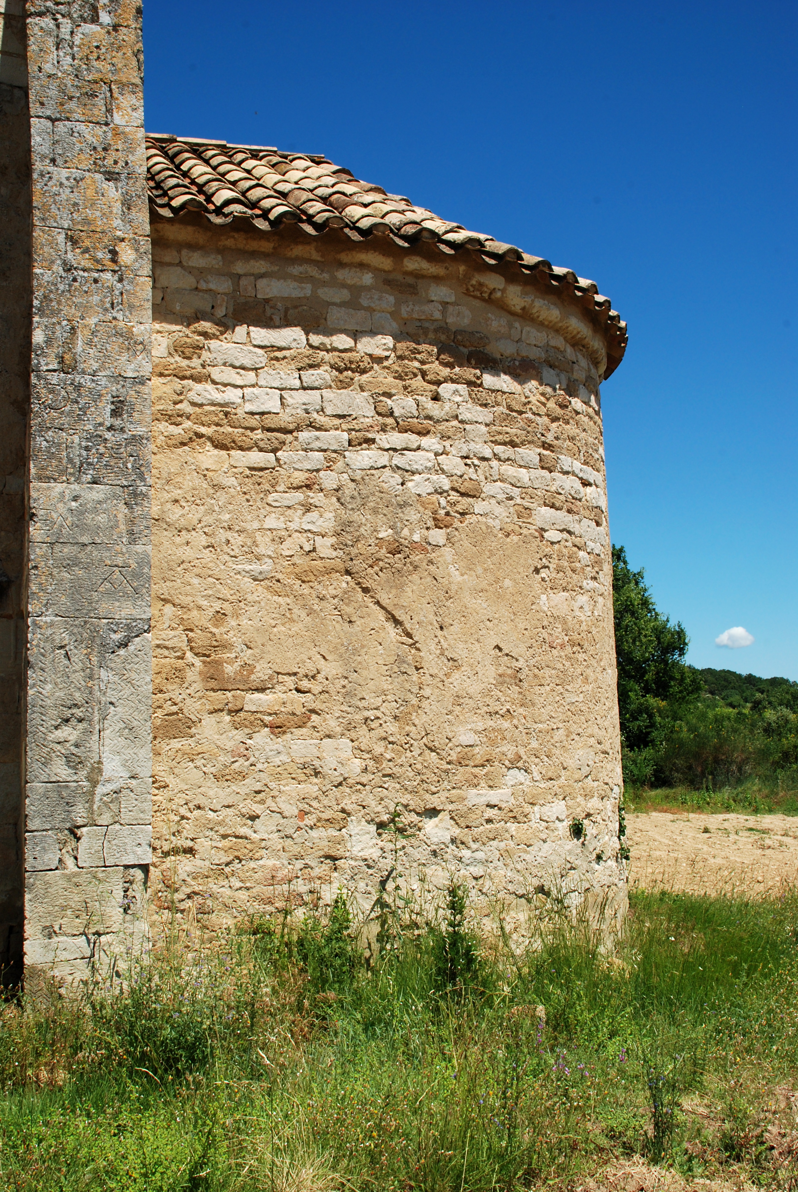 France - Église Saint-Pierre-ès-Liens de Colonzelle